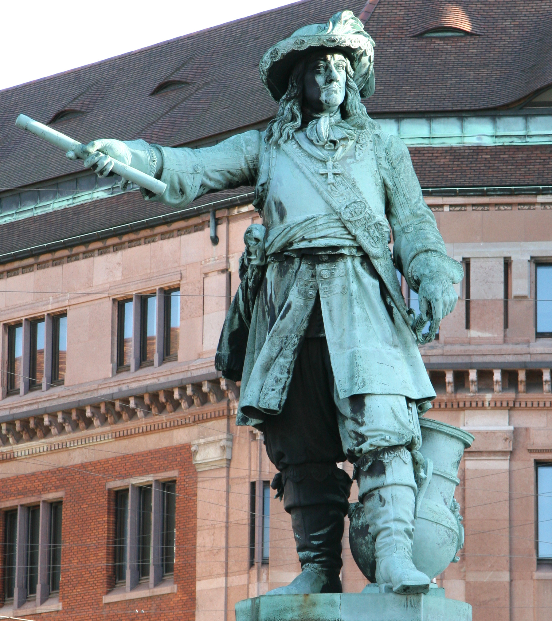 Niels Juels statue i Holmens Kanal i København. Statue of Niels Juel in Copenhagen.